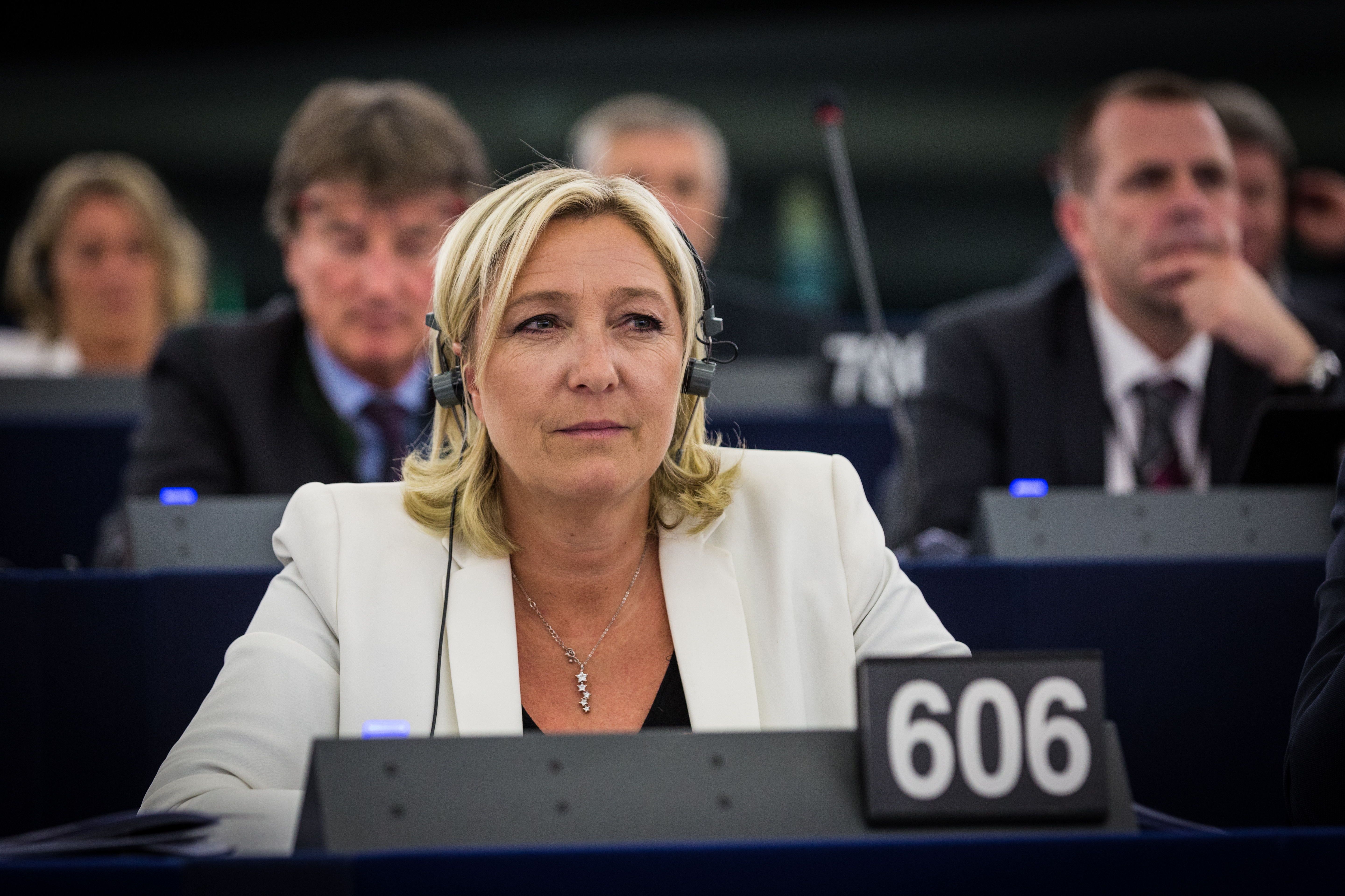 Marine Le Pen Parlement européen Strasbourg 1er juillet 2014